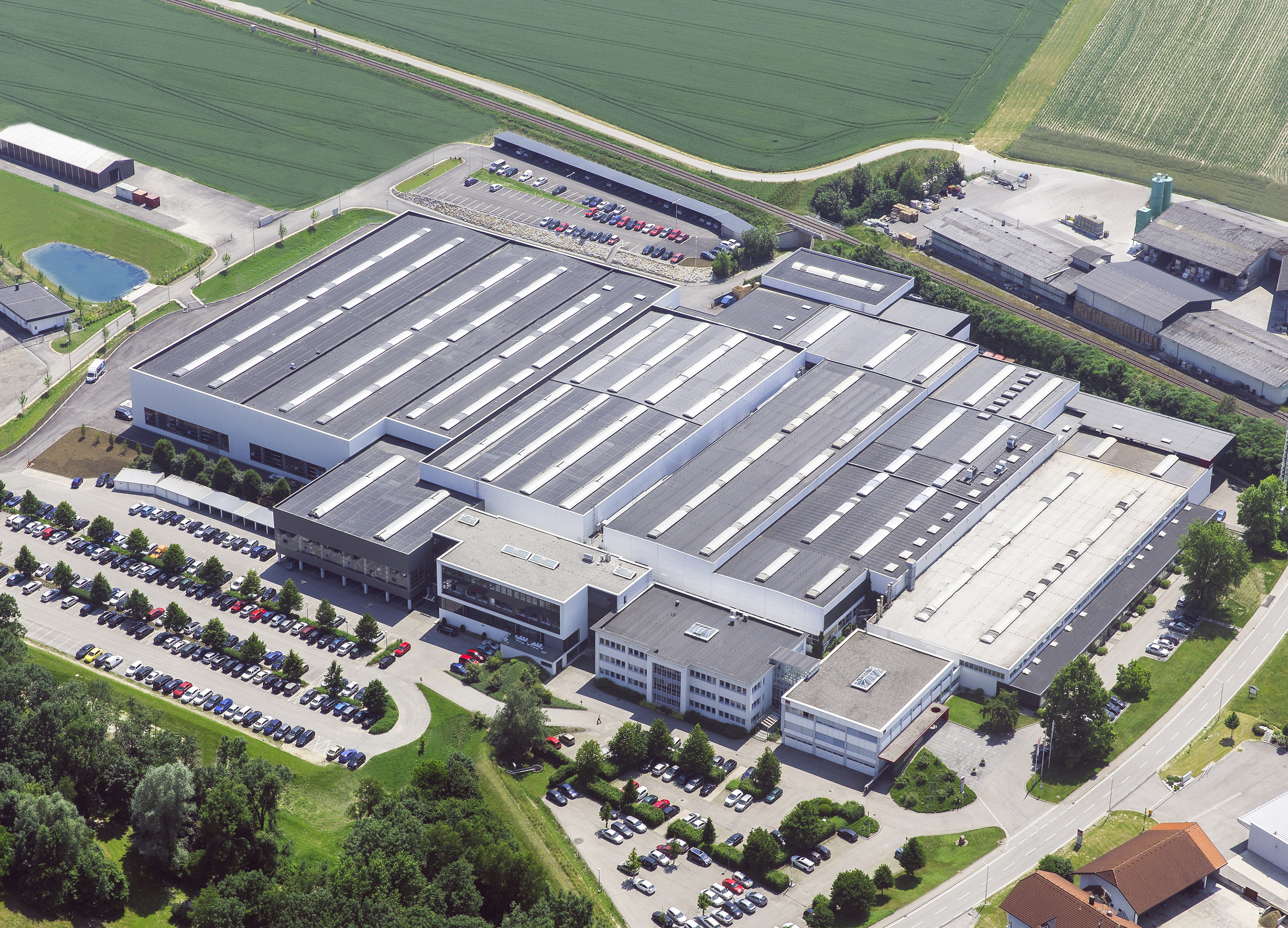 Fill Gesellschaft m.b.H., 2013